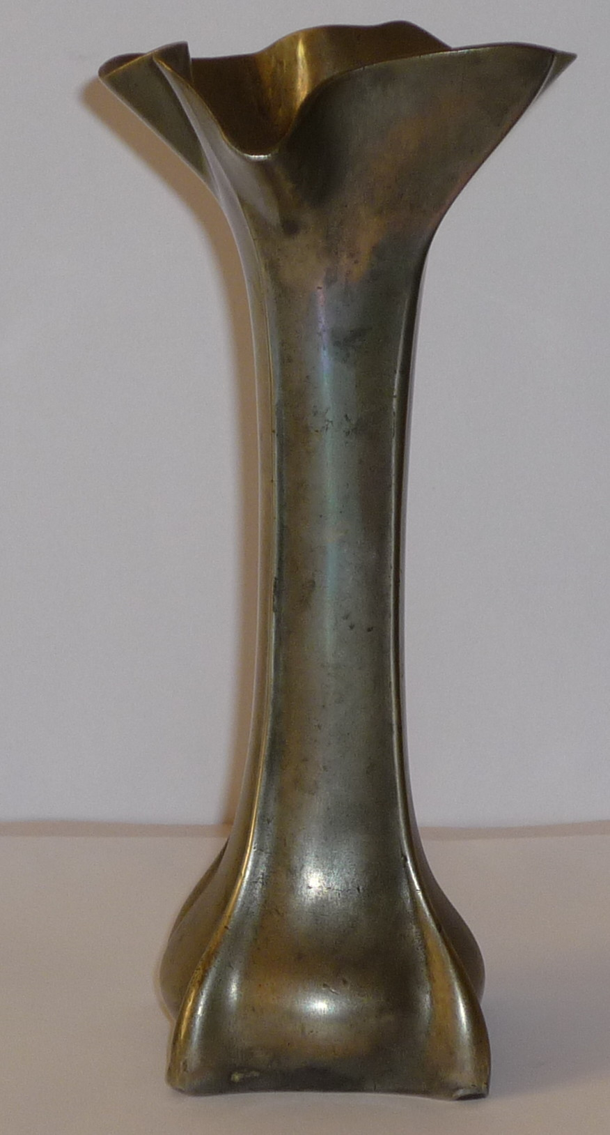 Vase en étain, de style Art nouveau, de type Orivit, référence n°2568, 16 cm de hauteur.